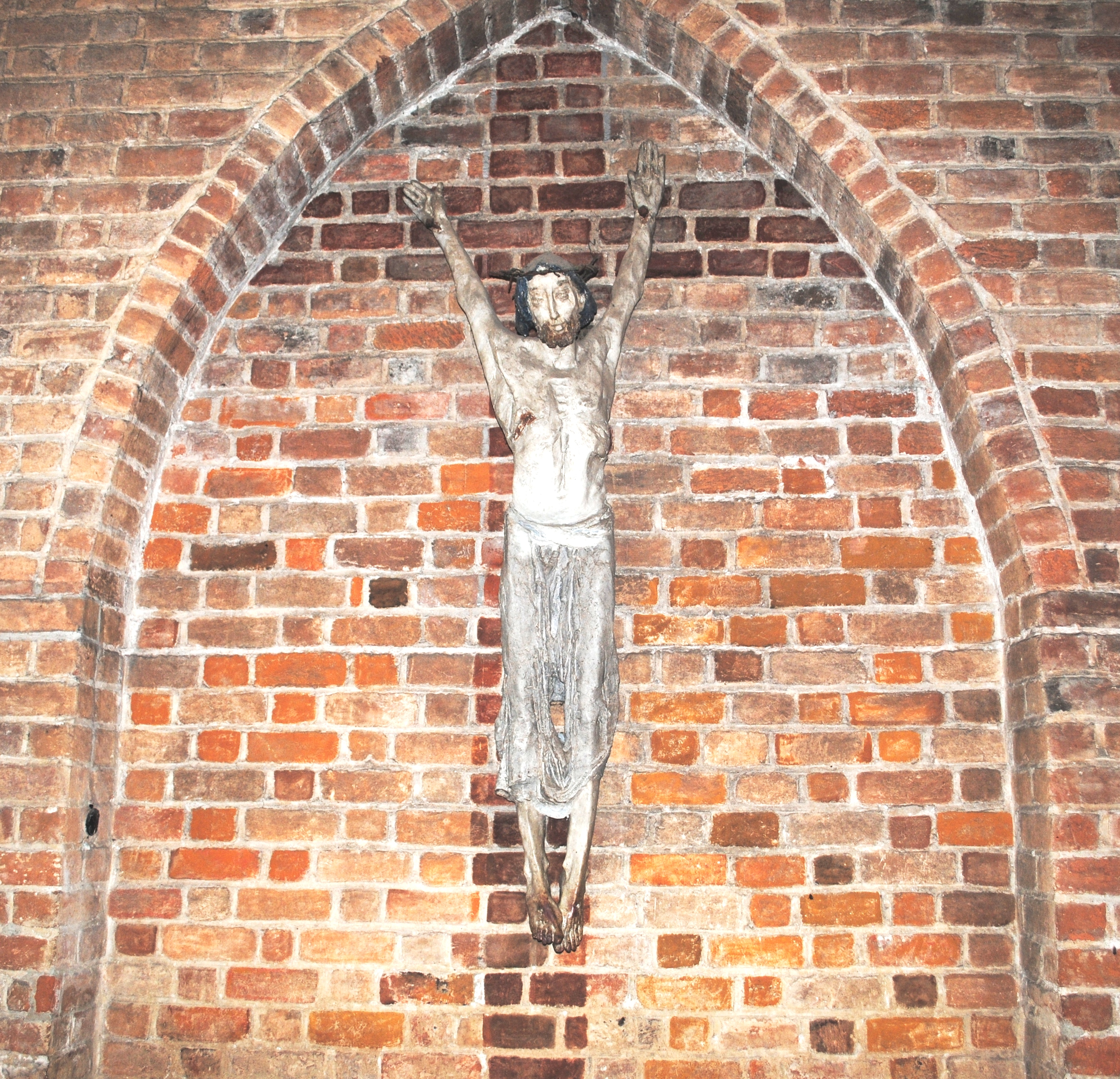 Gdańsk Oliwa, ul. Opacka - rzymskokatolicki kościół parafialny, obecnie filialny p.w. św. Jakuba, XIV-XV, 1709, 2 poł. XIX